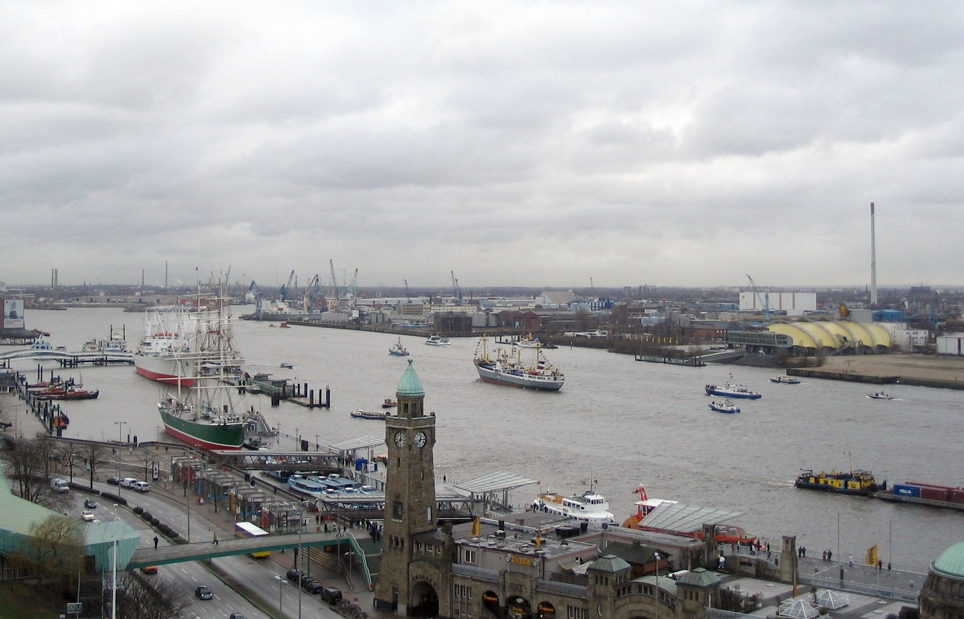 Das Museumsschiff Old Lady bei der Ankunft im Hamburger Hafen. Am linken Bildrand sind die beiden Museumsschiffe Cap San Diego und Rickmer Rickmers zu sehen. Rechts steht das Musicaltheater, in dem der "König der Löwen" aufgeführt wird.